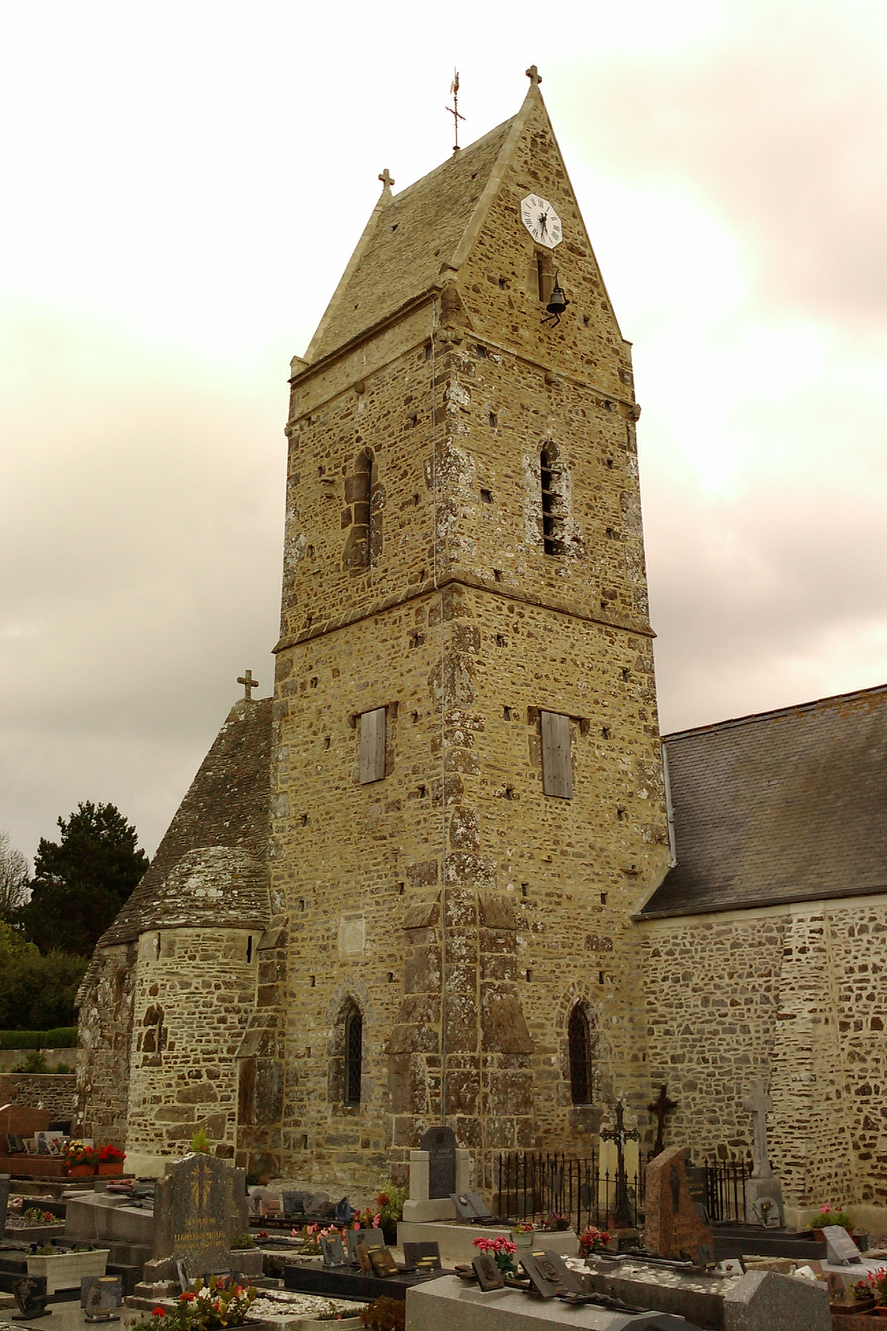 église (XIVe,XVe) de Saint-Georges-de-la-Rivière Le clocher est contruit pour servir de tour de guet et de défense